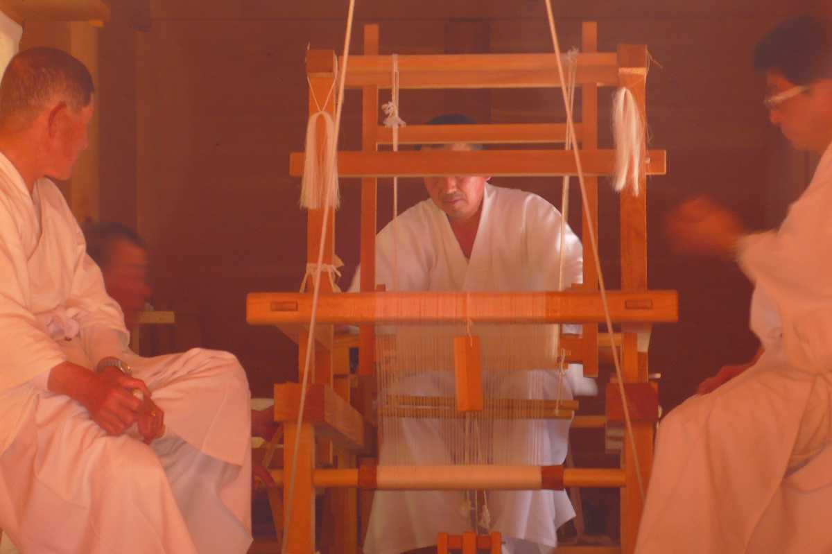 Weaving at Kan-omi-hatadono-jinja